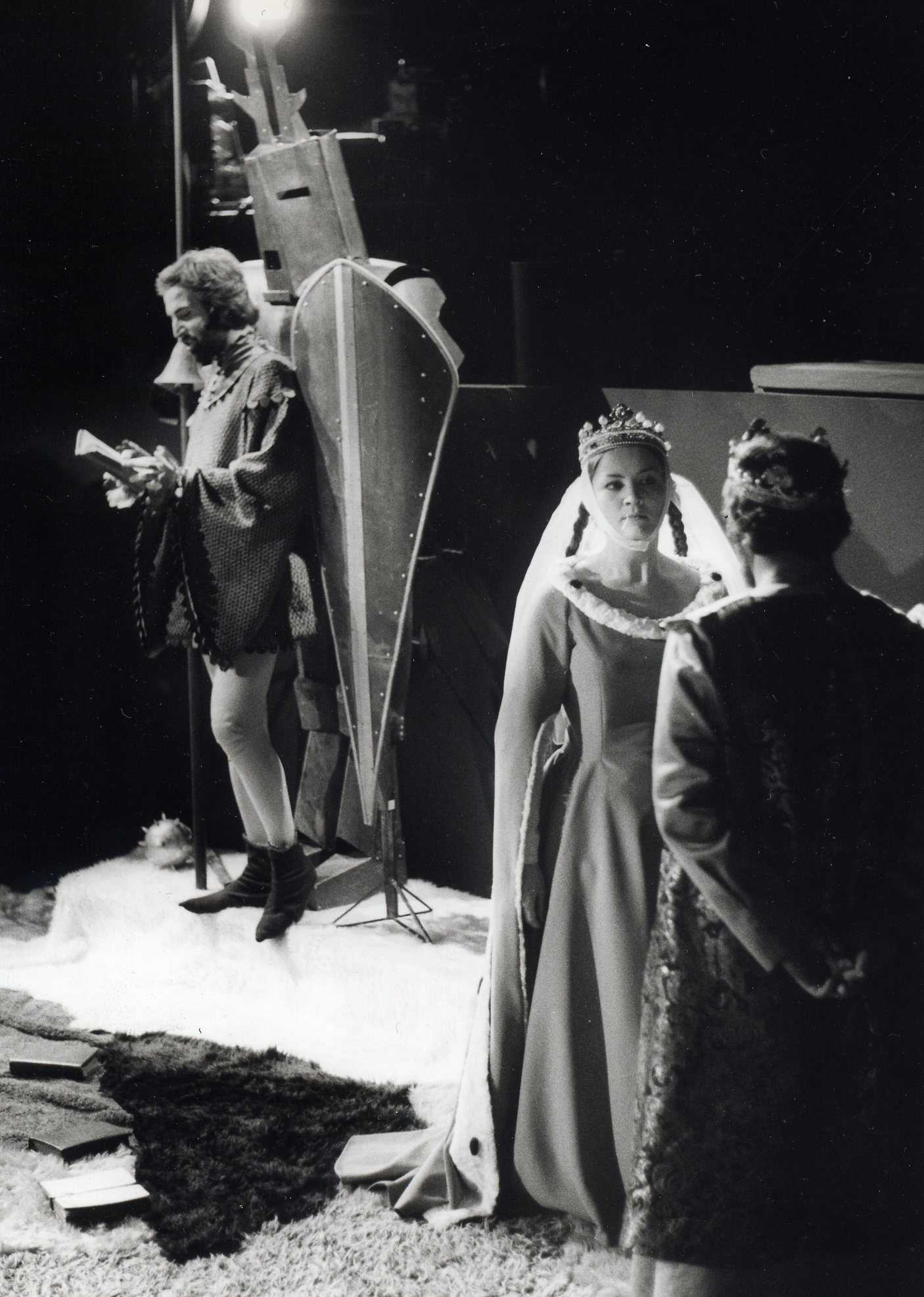 Représentation de "Grandeur et échec du royaume d'Arts", de Jean-Louis Sarthou, au Studio d'Ivre en février 1976: Frédéric Girard, Dany Tayarda et Raymond Bisbal (de g. à dr.)